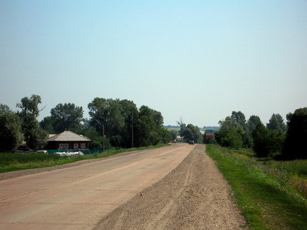 Дорога в Тальменке